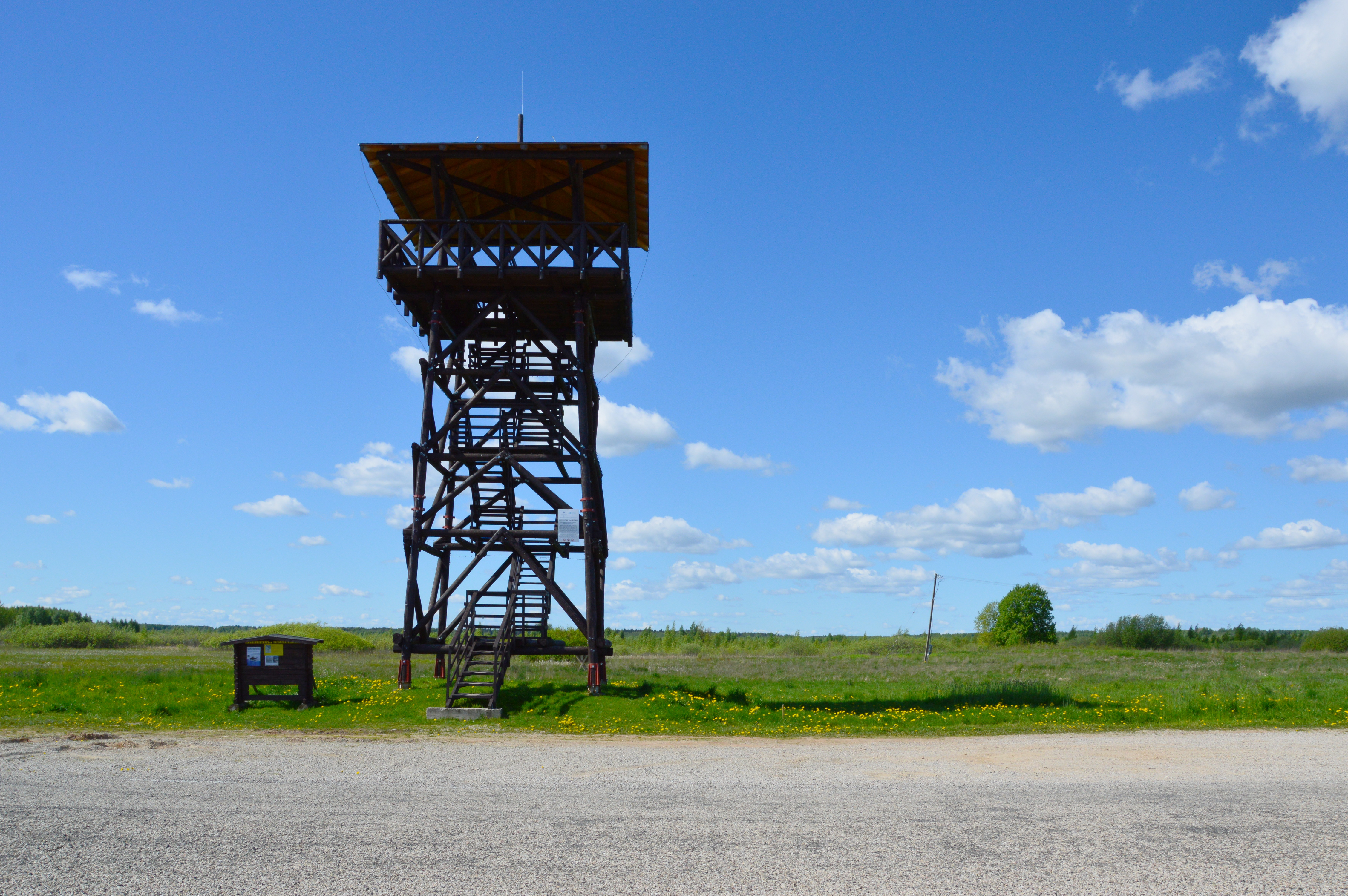 Lüübnitsa vaatetorn